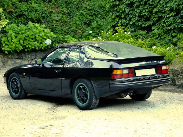 Porsche 924 Spirit